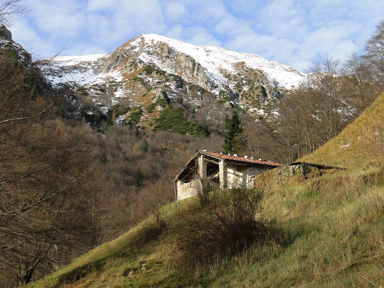 Cascina Rinati, val Gorgolina, Prealpi bergamasche. Premolo (BG)